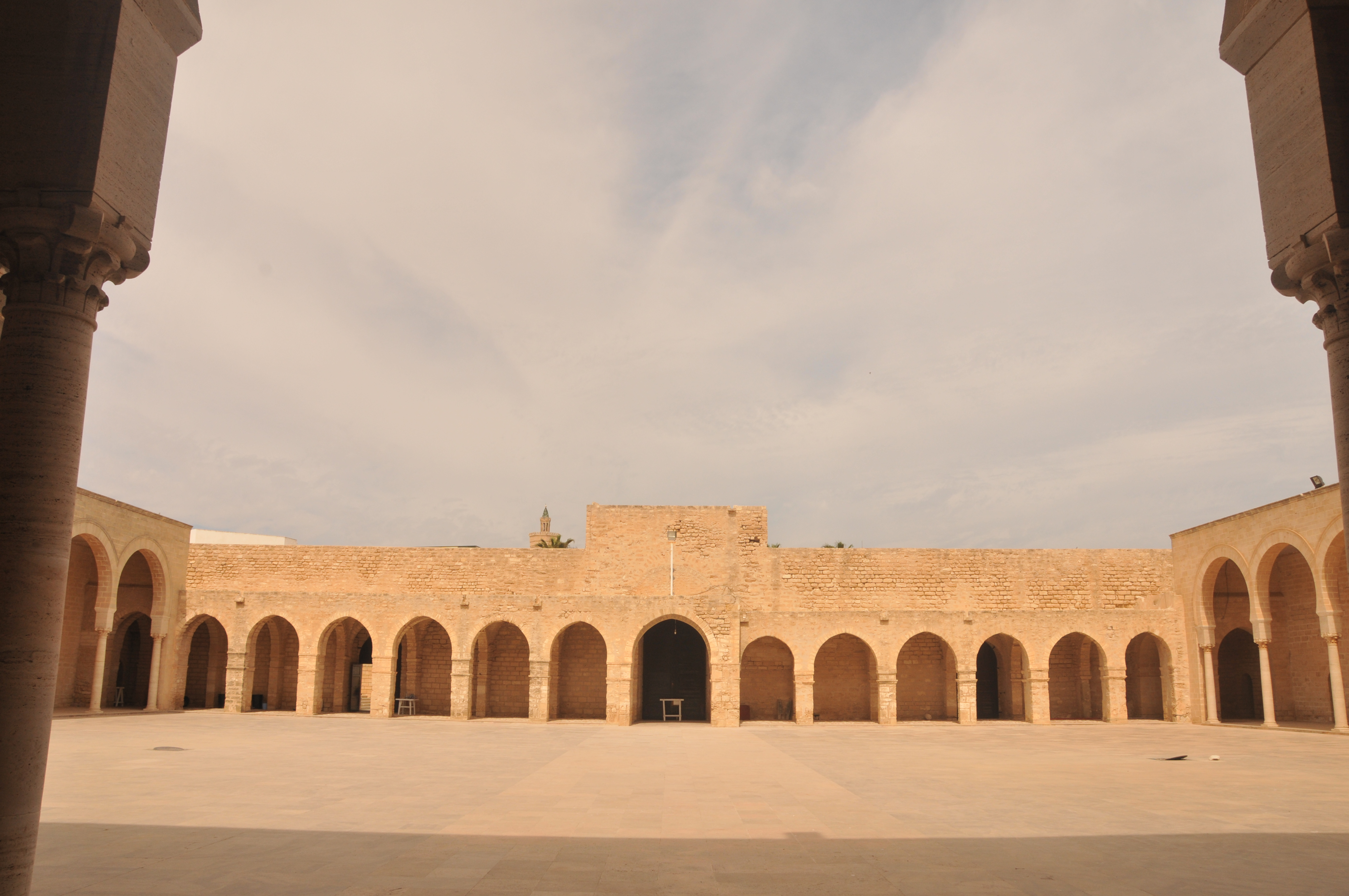 Cour de la grande mosquée de Mahdia. On voit au fond la porte d'entrée principale de la mosquée. La salle de prière se situe en arrière de la photo.